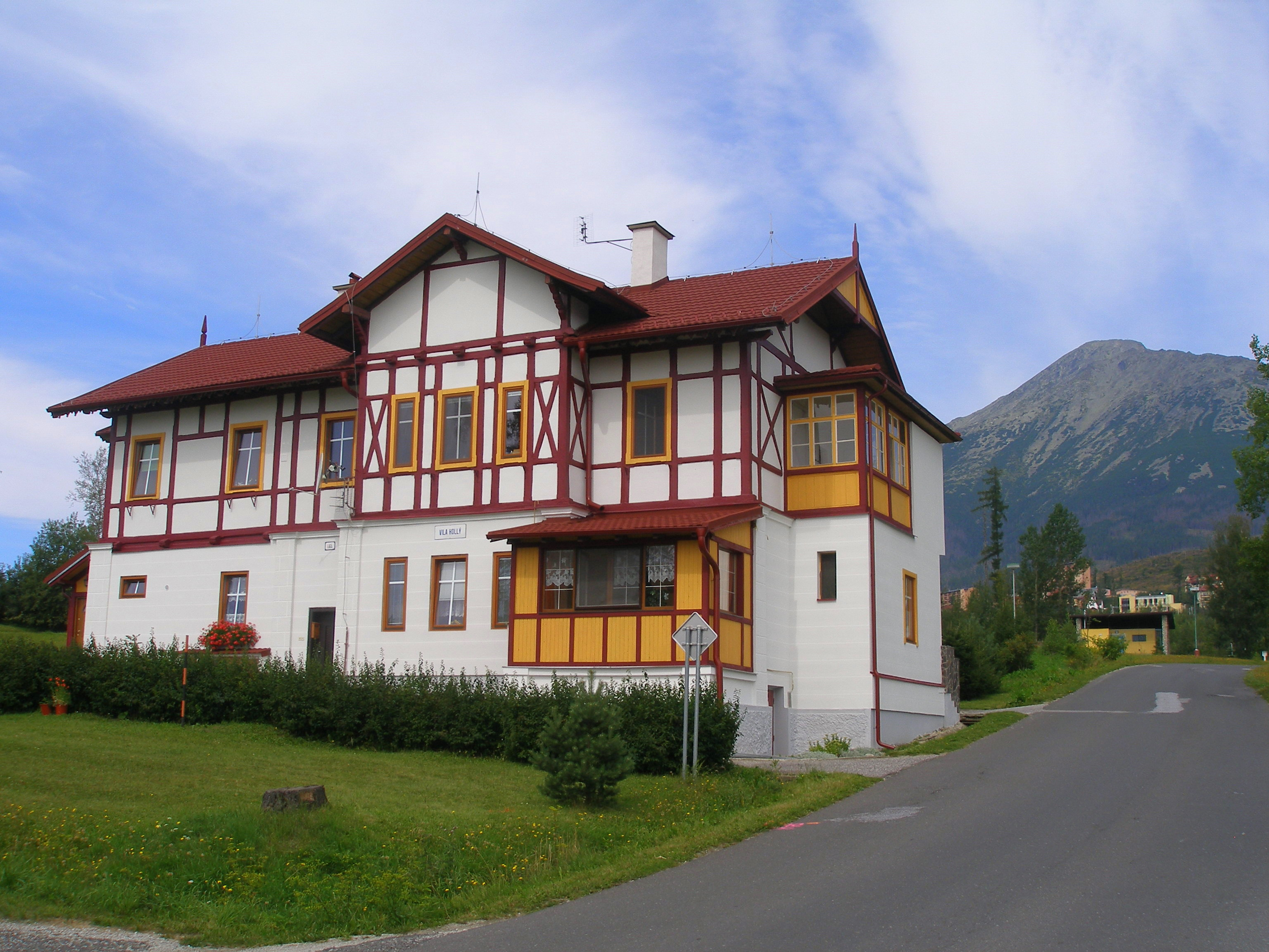 Tatranská osada Dolný Smokovec, mesto Vysoké Tatry, okres Poprad.